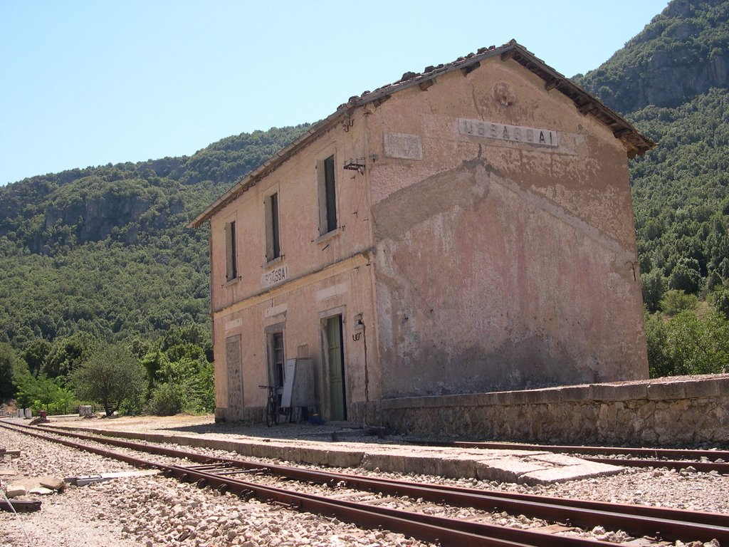 Stazione di Ussassai (luglio 2008)